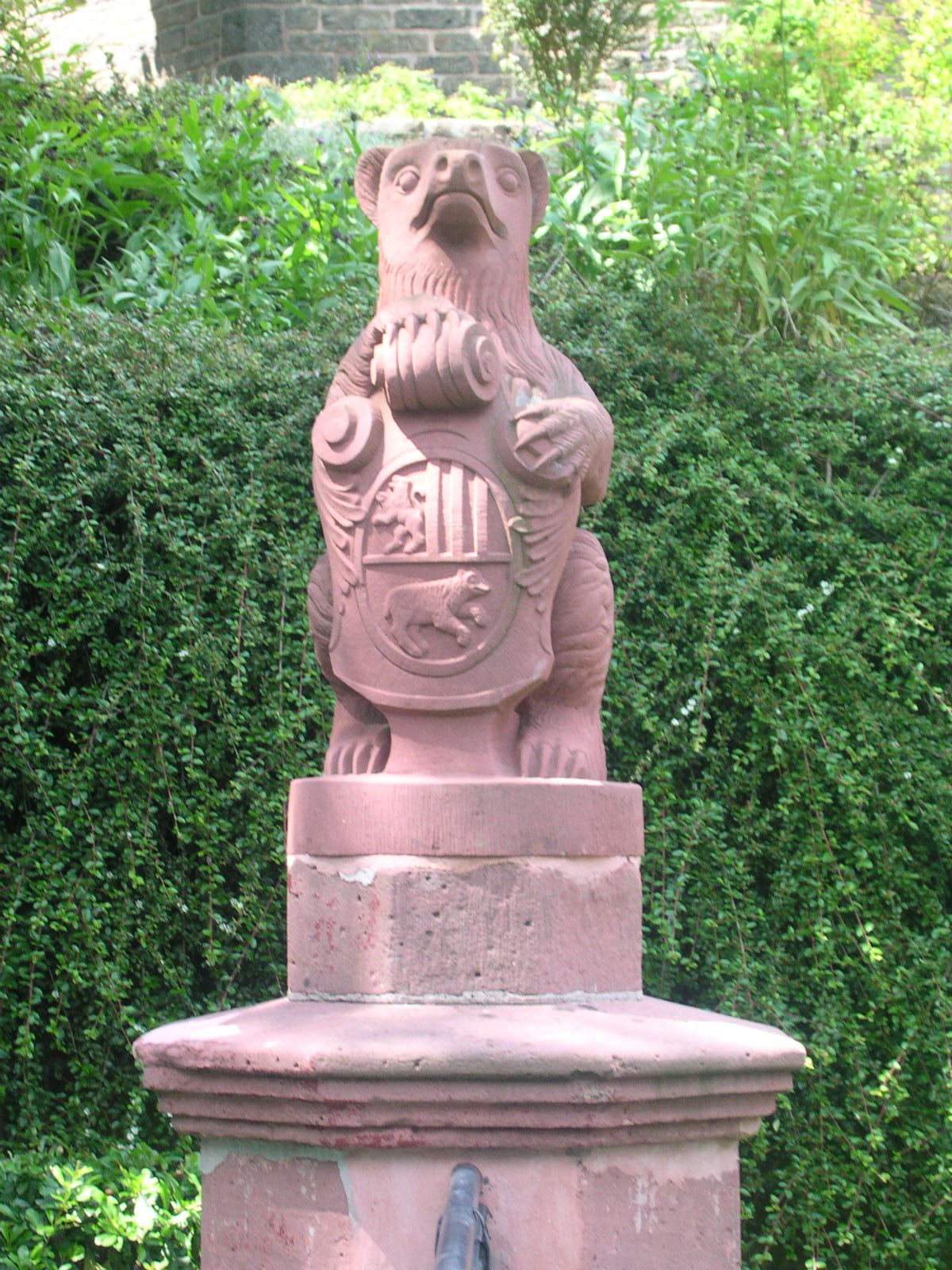 Bad Berleburg, Brunnen